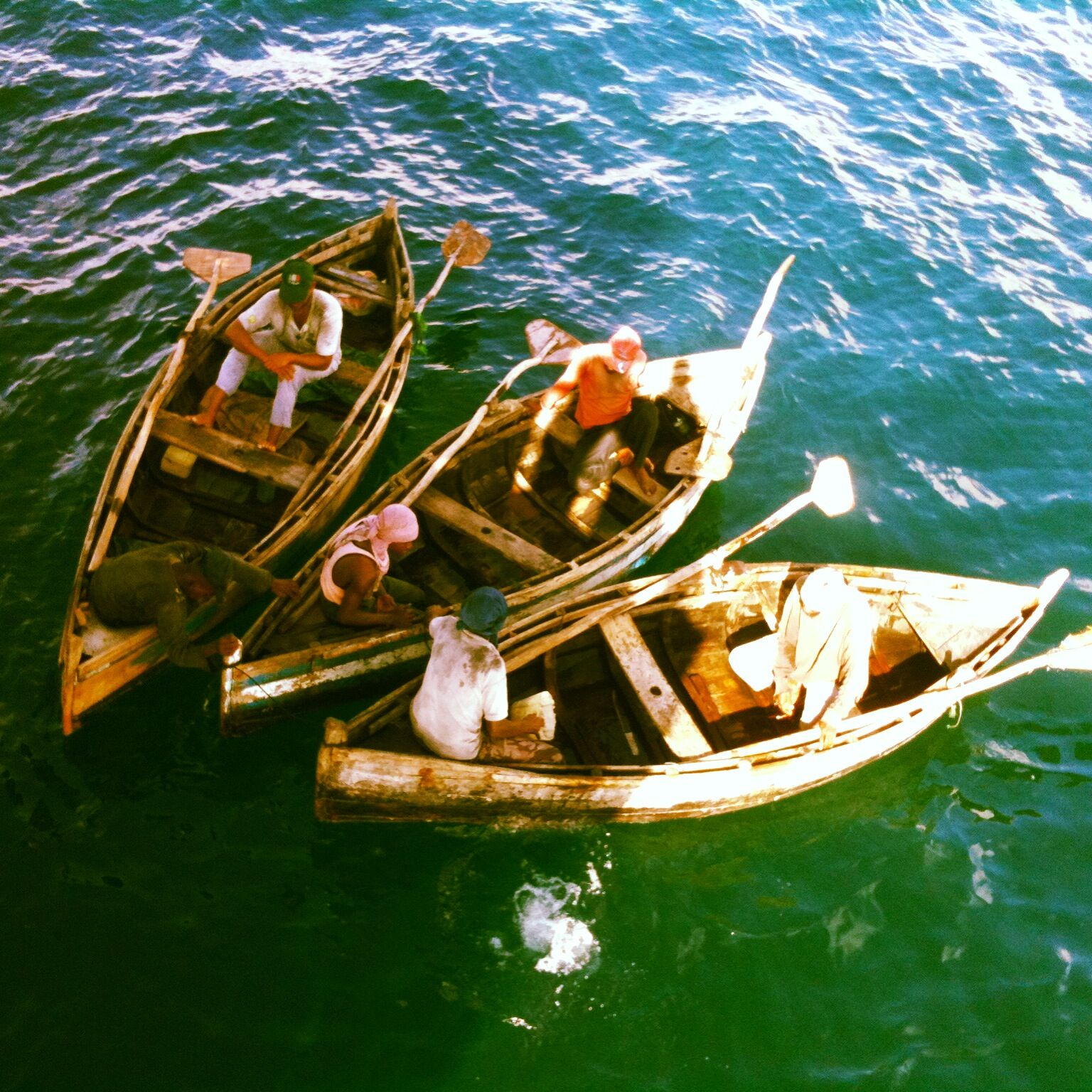 Soomaaliga: baraawe